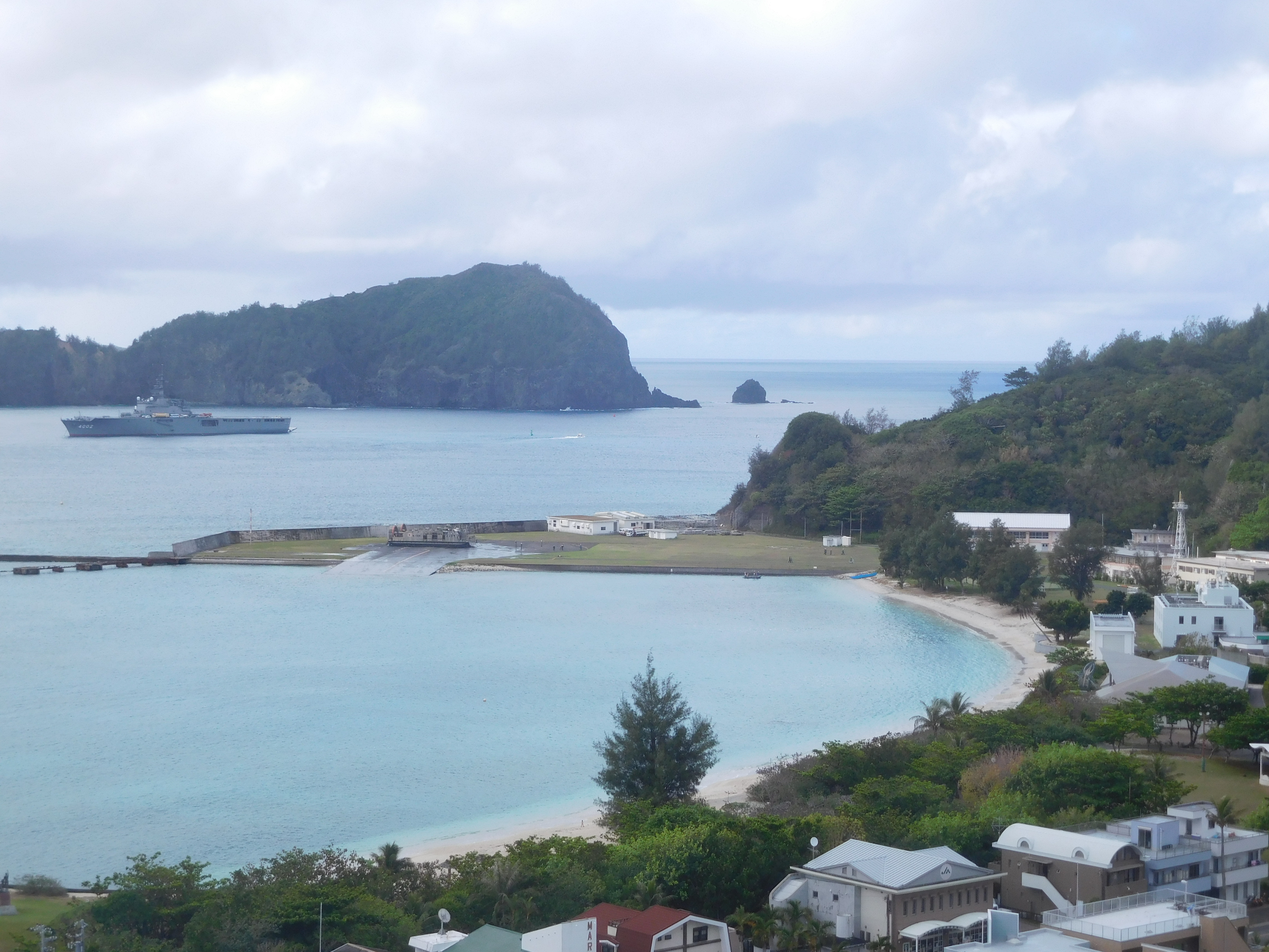 海上自衛隊 父島基地 ホバークラフトが上陸中 20160922撮影